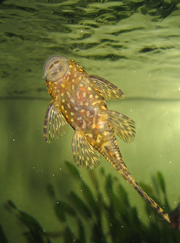 Bristlenose pleco, female (Ancistrus)